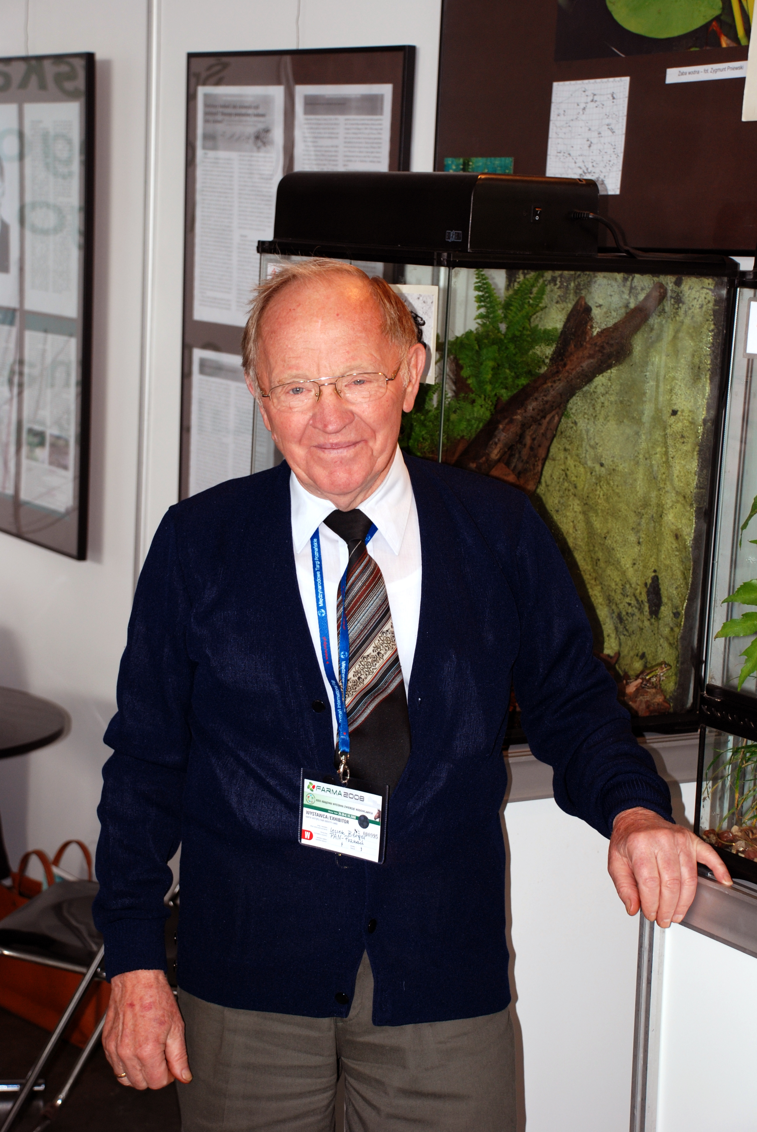 Prof. Leszek Berger